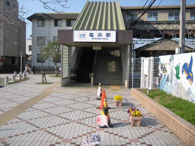 塩浜駅